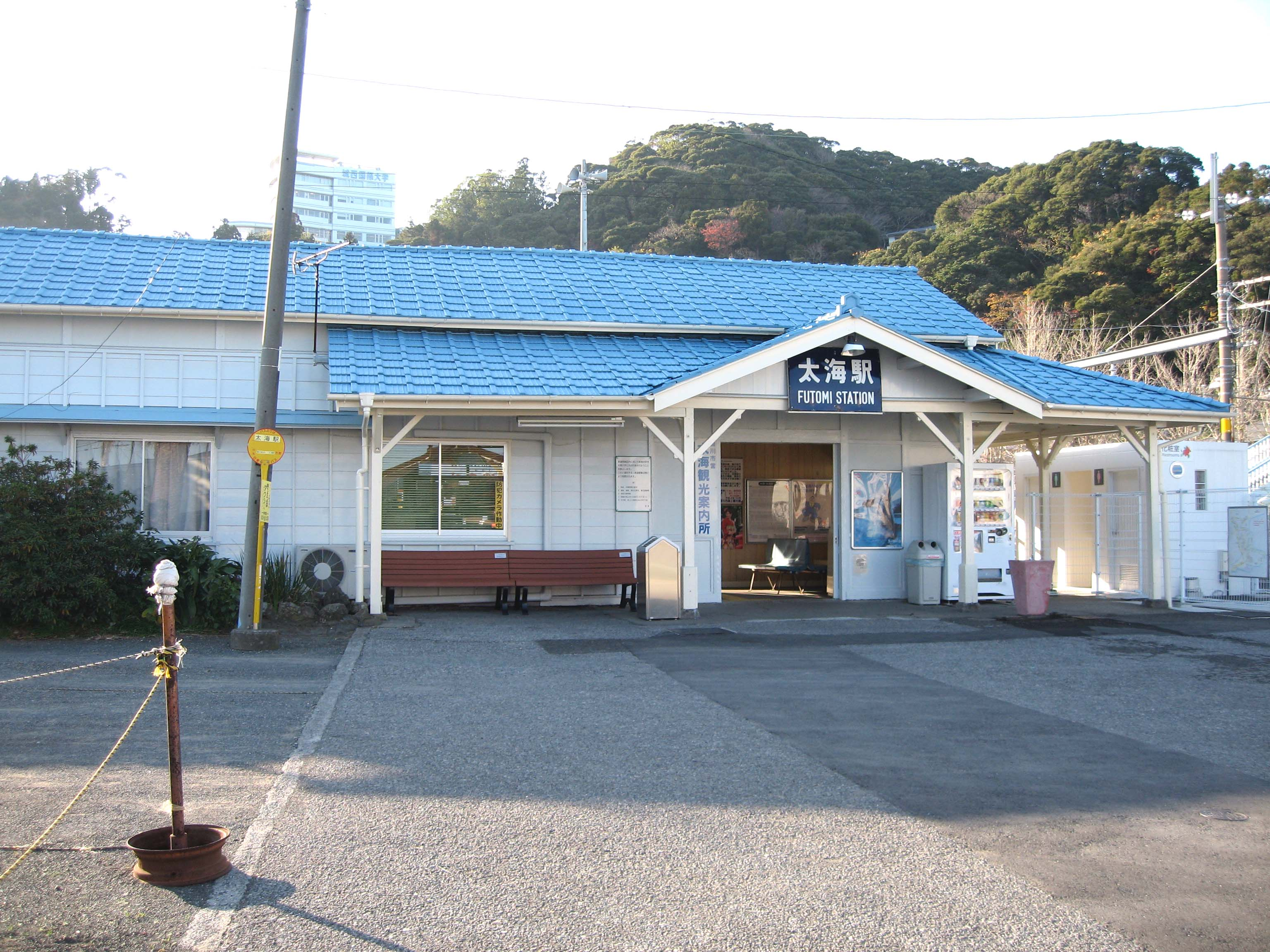 Futomi station, Uchibo Line, Chiba, Japan, 太海駅駅舎